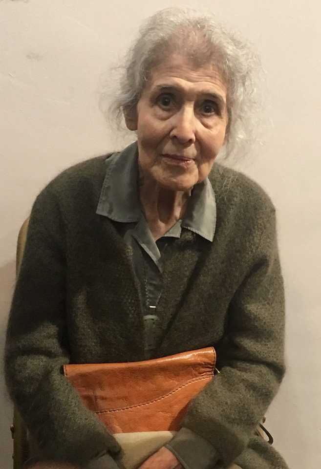 Cécile Reims à l'inauguration de son exposition rétrospective du Musée George Sand et de la Vallée noire au Château d'Ars le 1er juin 2019.